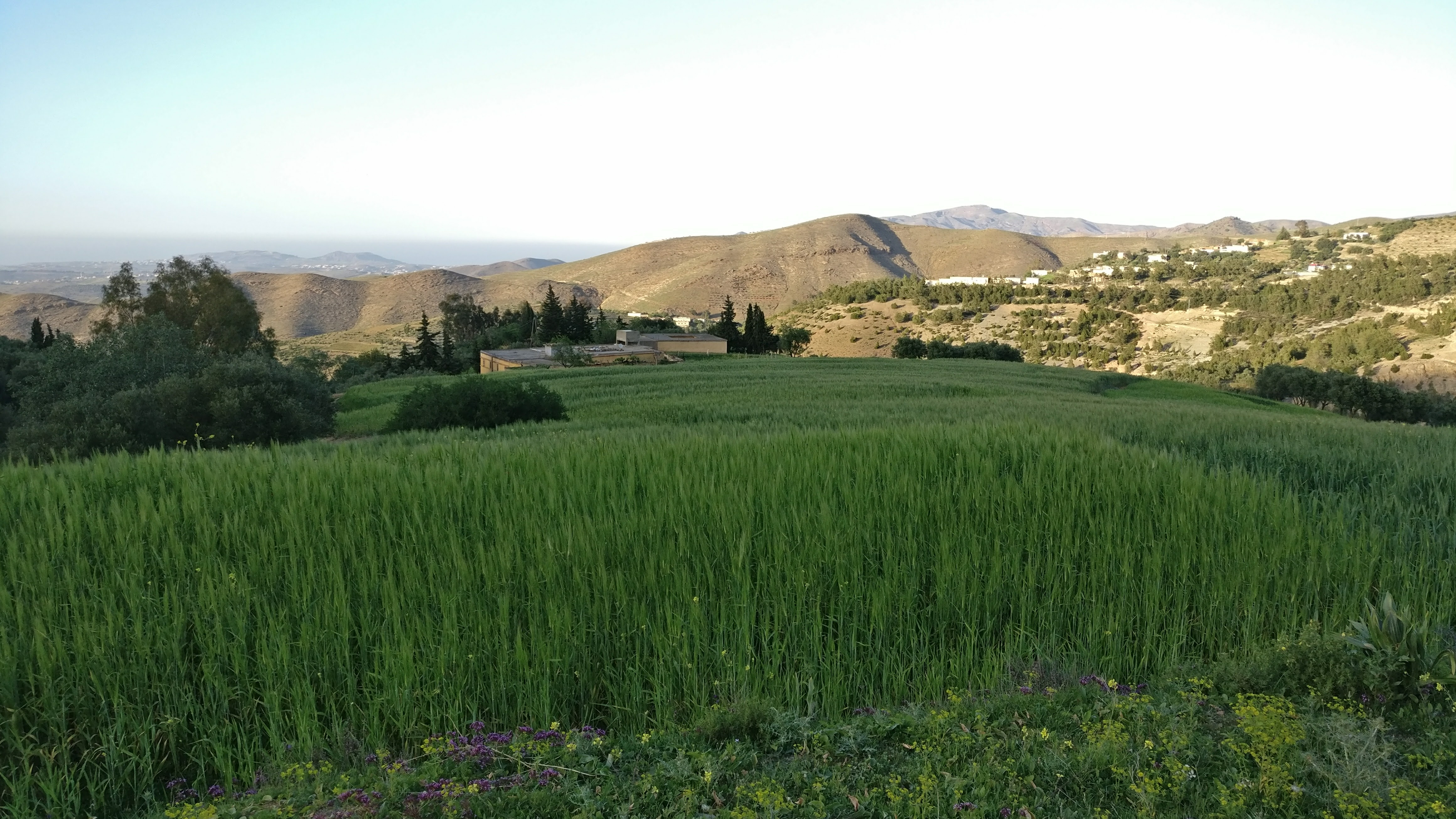 Ce village fait partie des Aït Touzine, faction Igharbiyen